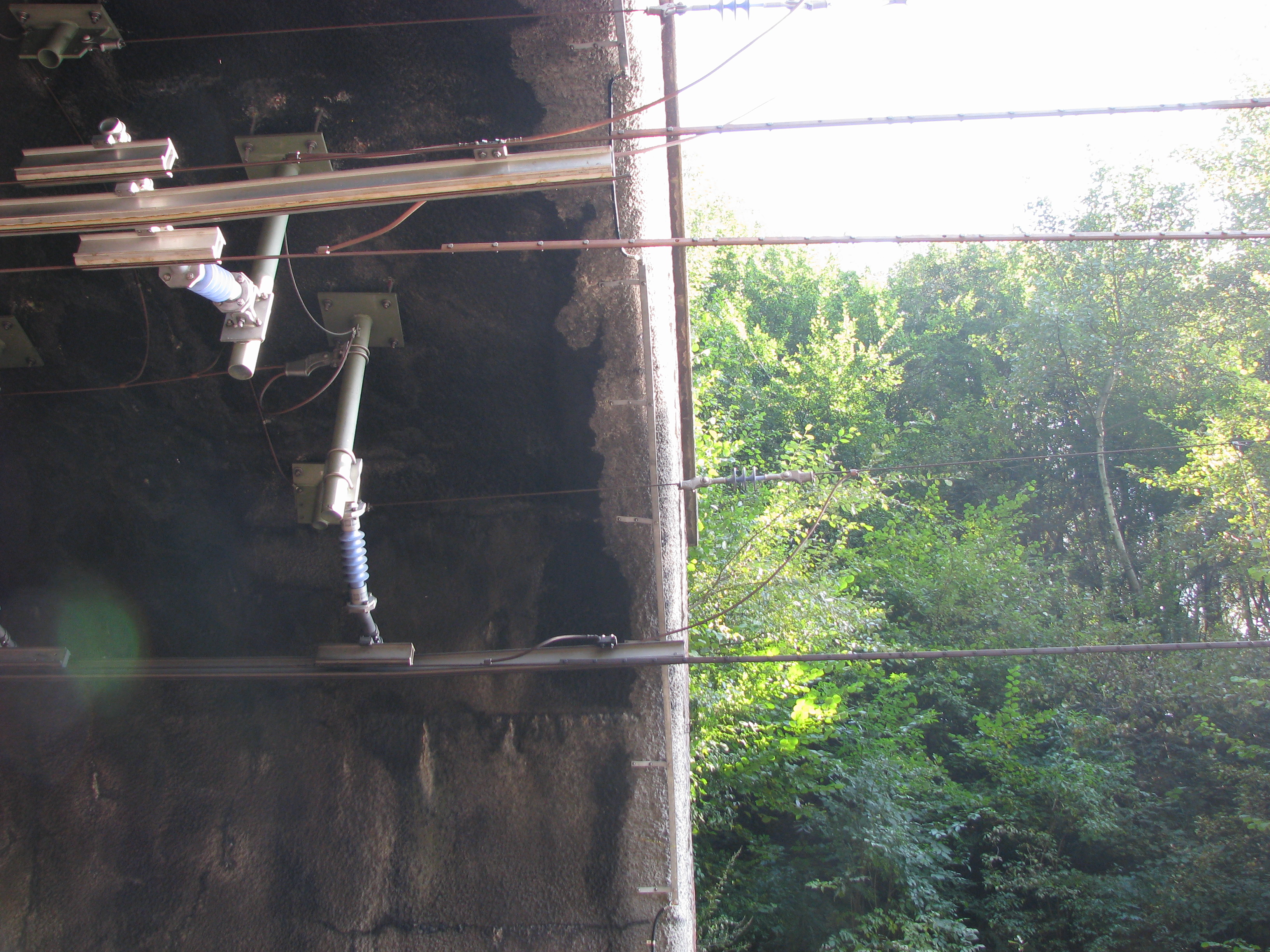 Der Gemmenicher Tunnel, Übergang der Oberleitung auf die aus Platzgründen im Tunnel installierte Stromschiene